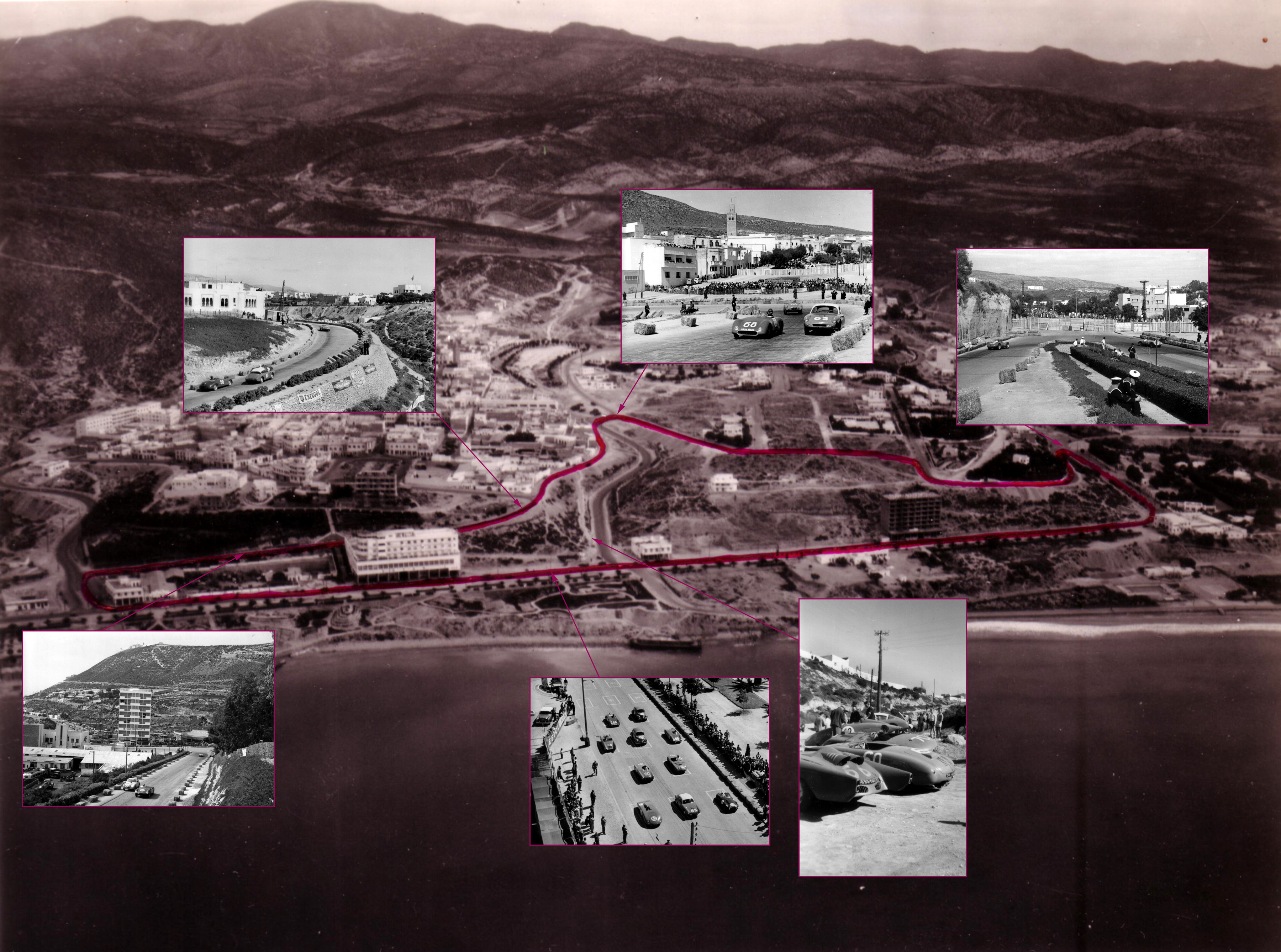 circuit automobile d'Agadir avec repères visuels